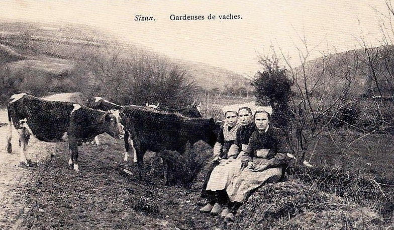 Gardeuses de vaches à Sizun vers 1910 (carte postale Hochez).